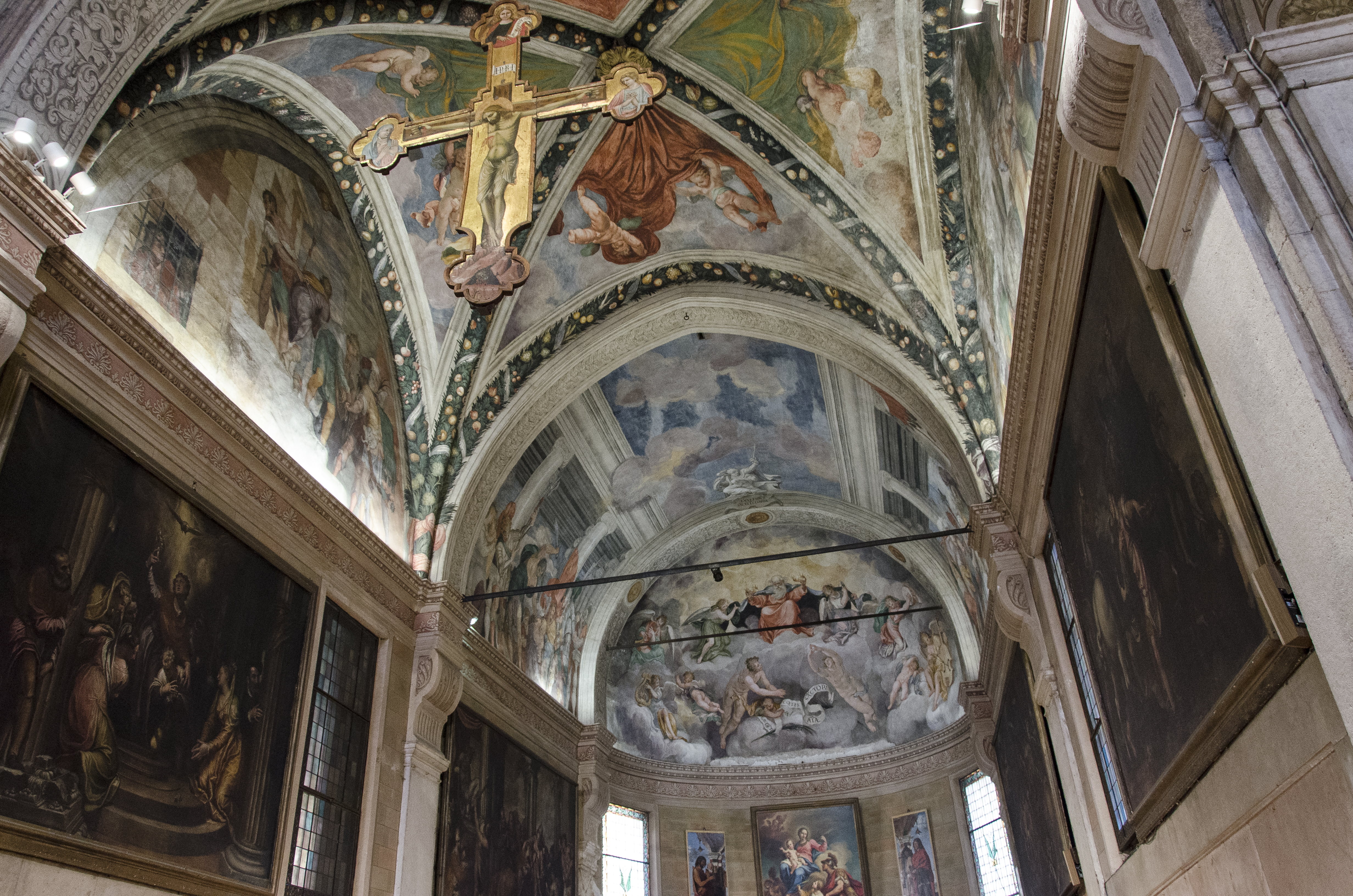 Chiesa dei Santi Nazaro e Celso a Verona. Interno, in stile rinascimentale.